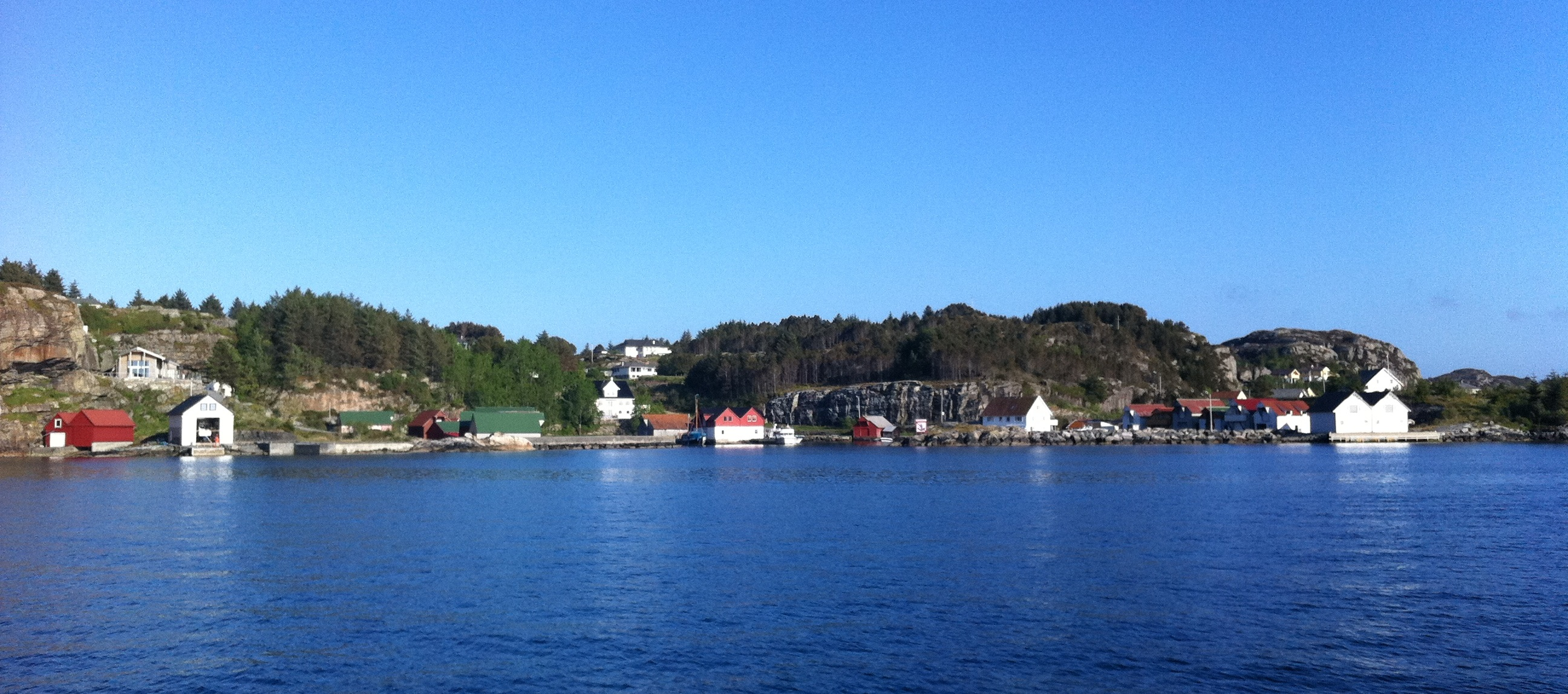 Toftevika på Tofterøy sett fra sjøen